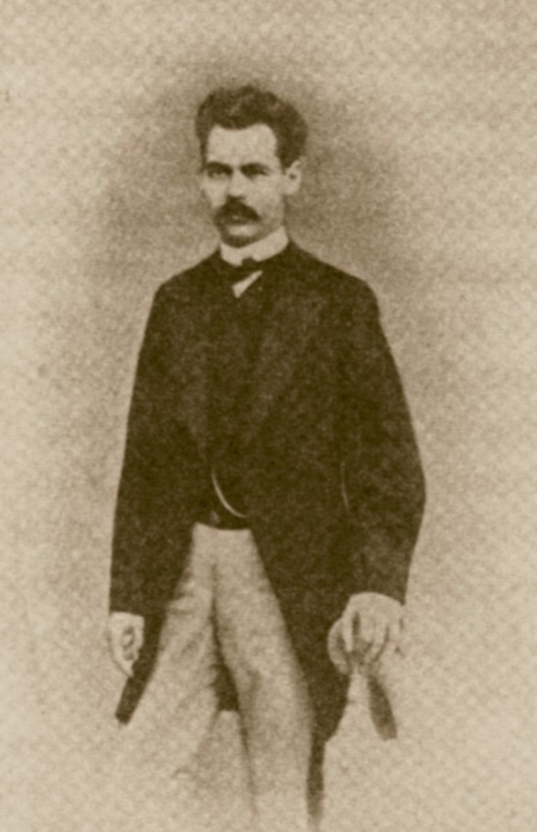 Fritz Mende (zeitgenössische Fotografie vor 1878)